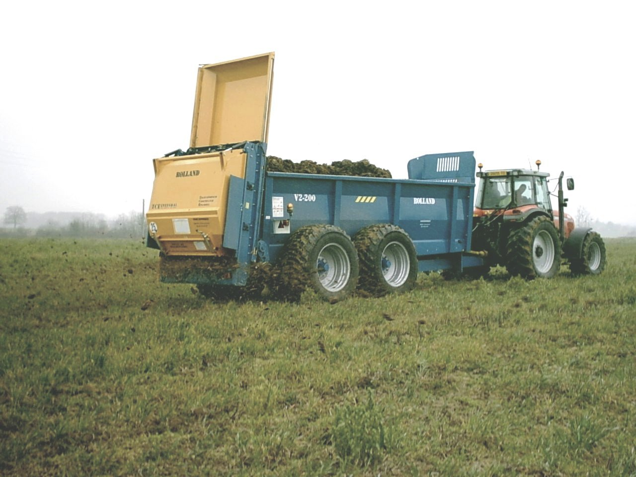 Epandeur de fumier Rolland avec table d'épandage